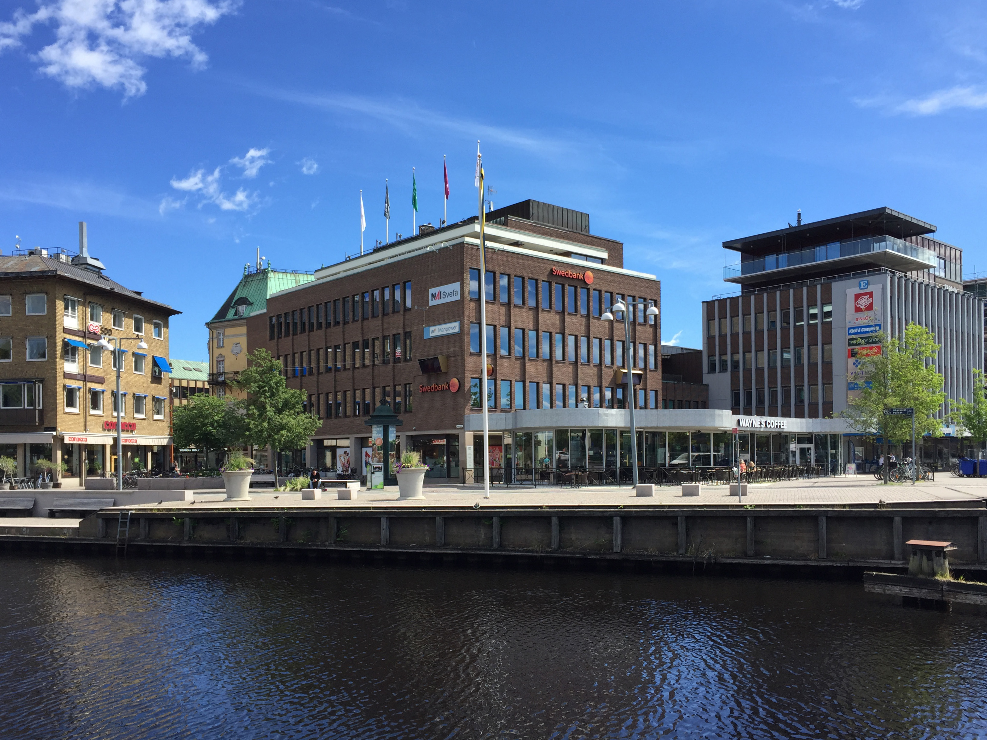 Ansvaret 1, Hoppets Torg 4 - Smedjegatan 2-6 Jönköping. Byggnadsår: 1963-1965 Byggherre: Jönköpings läns sparbank, Arkitekter: Folke Hederus tillsammans med Johan Wohlert vid Sparfrämjandets arkitektkontor, i samma kvarter varuhus för EPA.